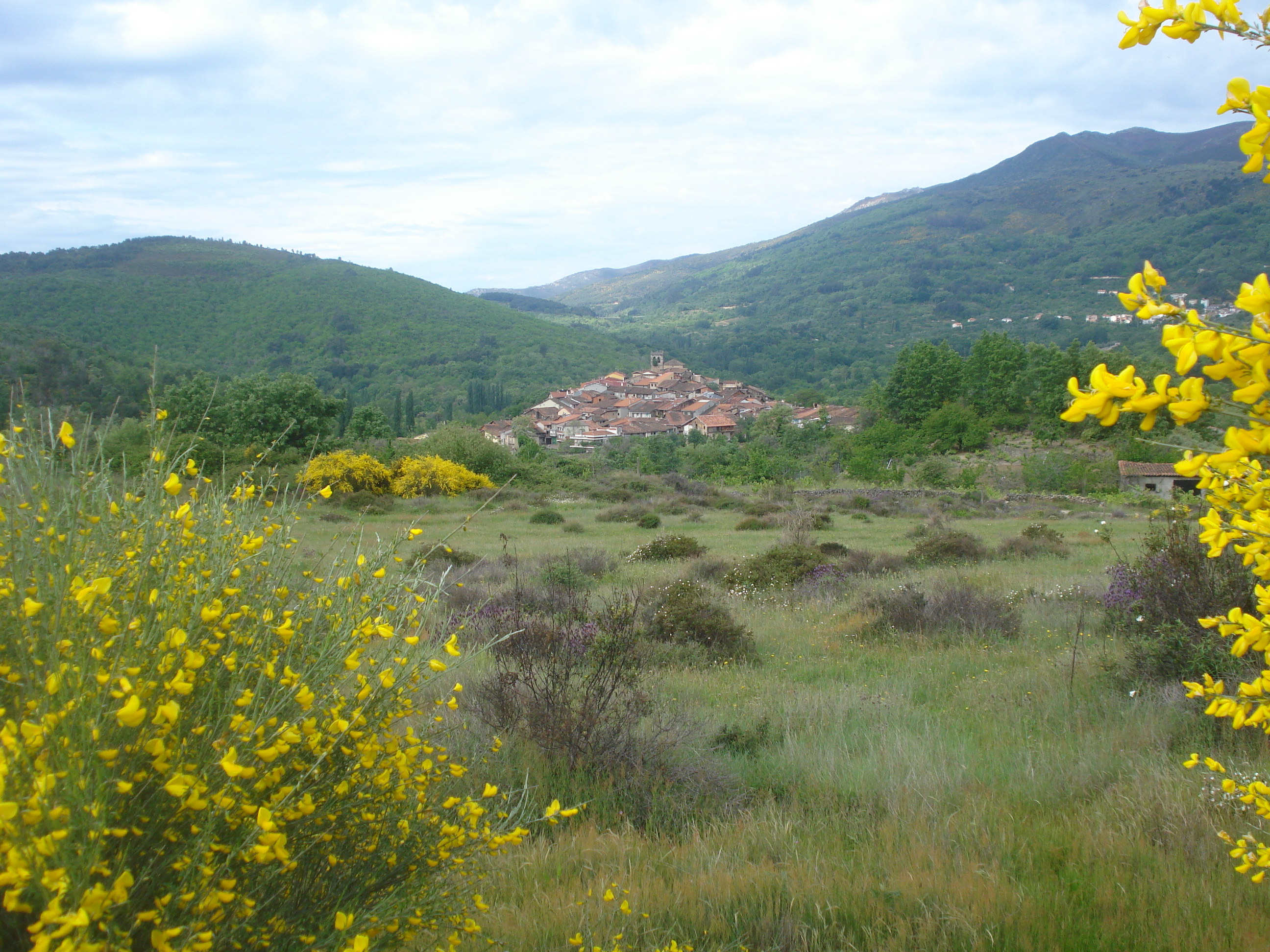 Cepeda en primavera